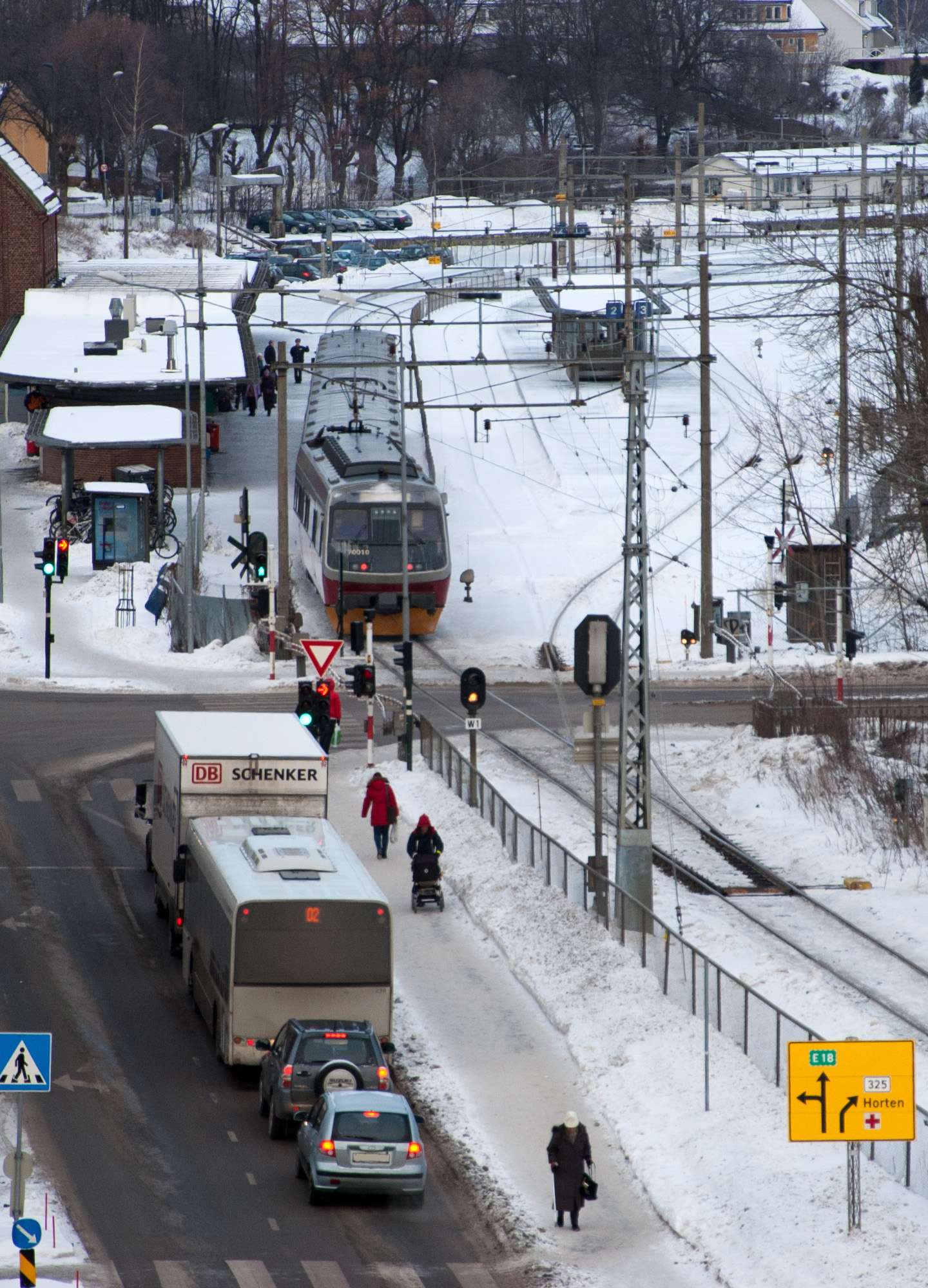 Tønsberg Jernbanestasjon, sett langs Jernbanegaten. Planovergangen er i Halfdan Wilhelmsens allé.